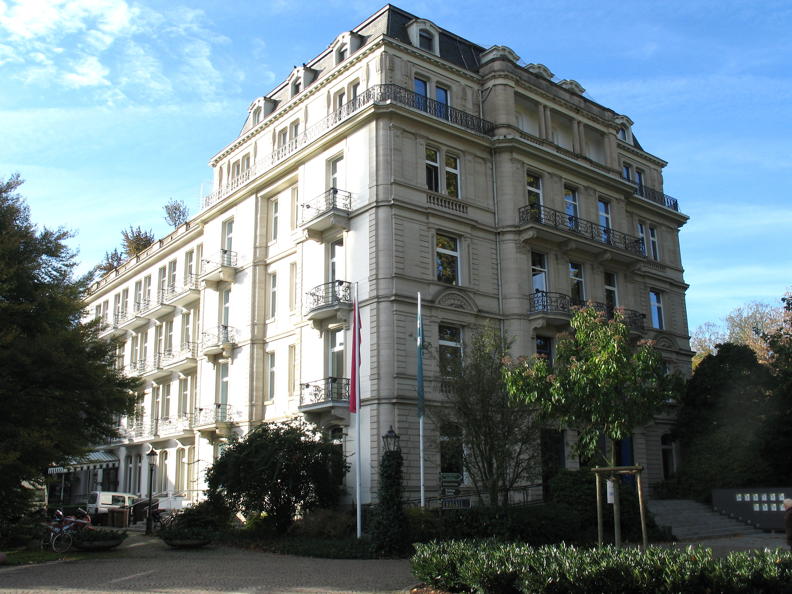 L'TUR- und Media-Control-Firmenzentrale in der Innenstadt von Baden-Baden